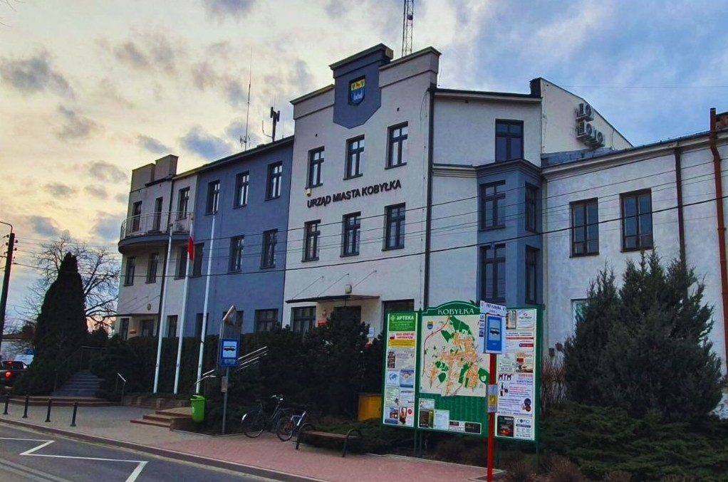 Kobyłka urząd miasta